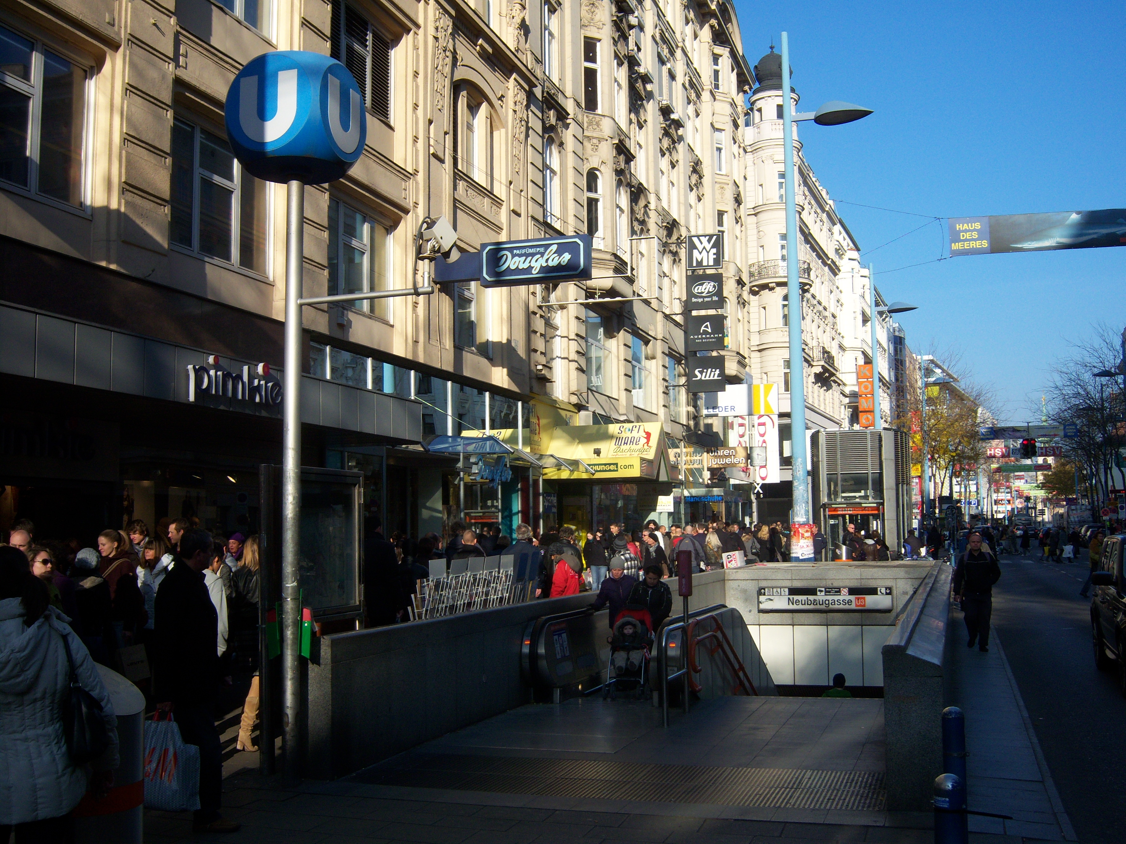 Zugang zur U-Bahn-Station Neubaugasse